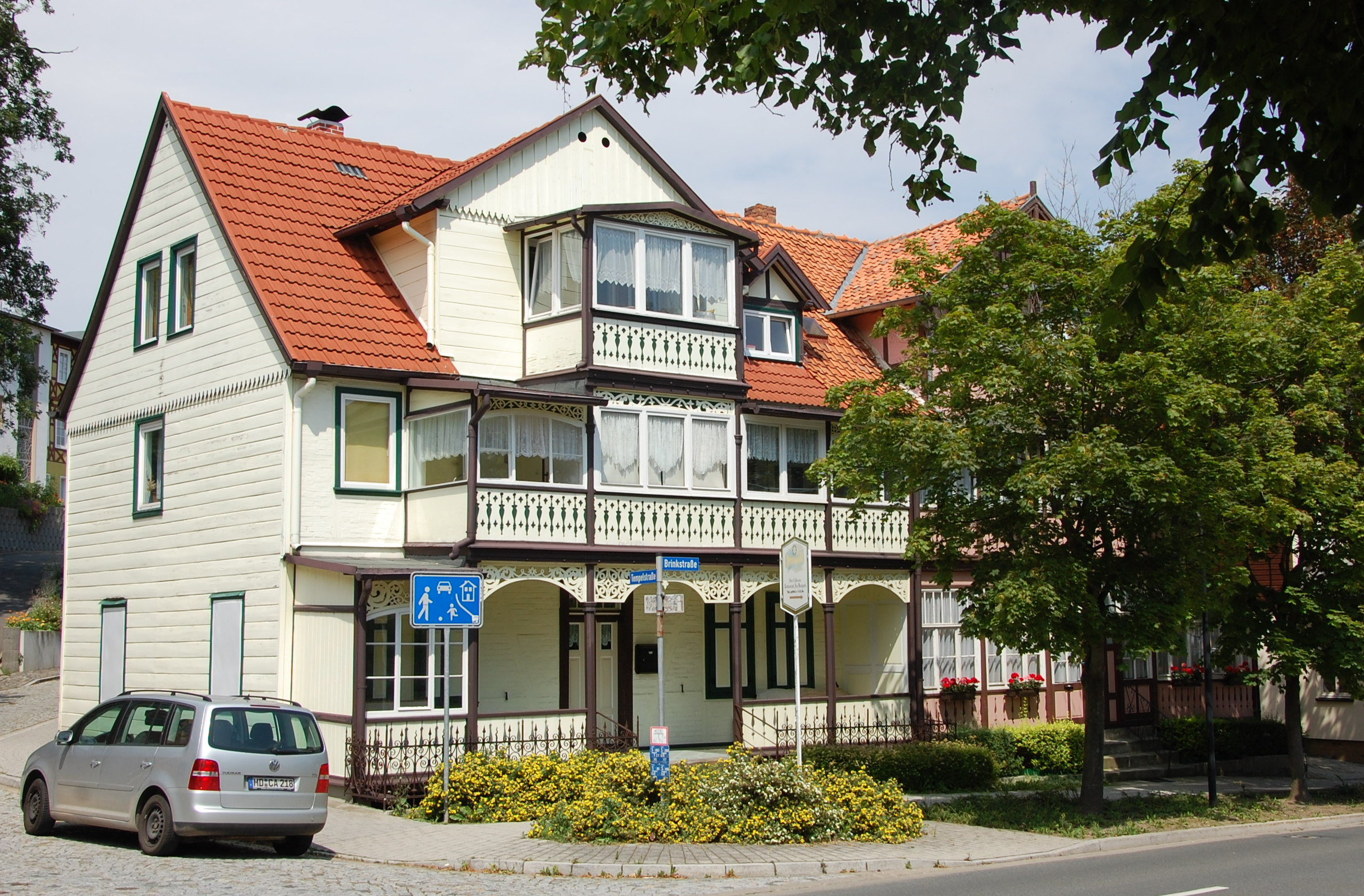 Häuser Brinkstraße 32 und 34 in Bad Suderode